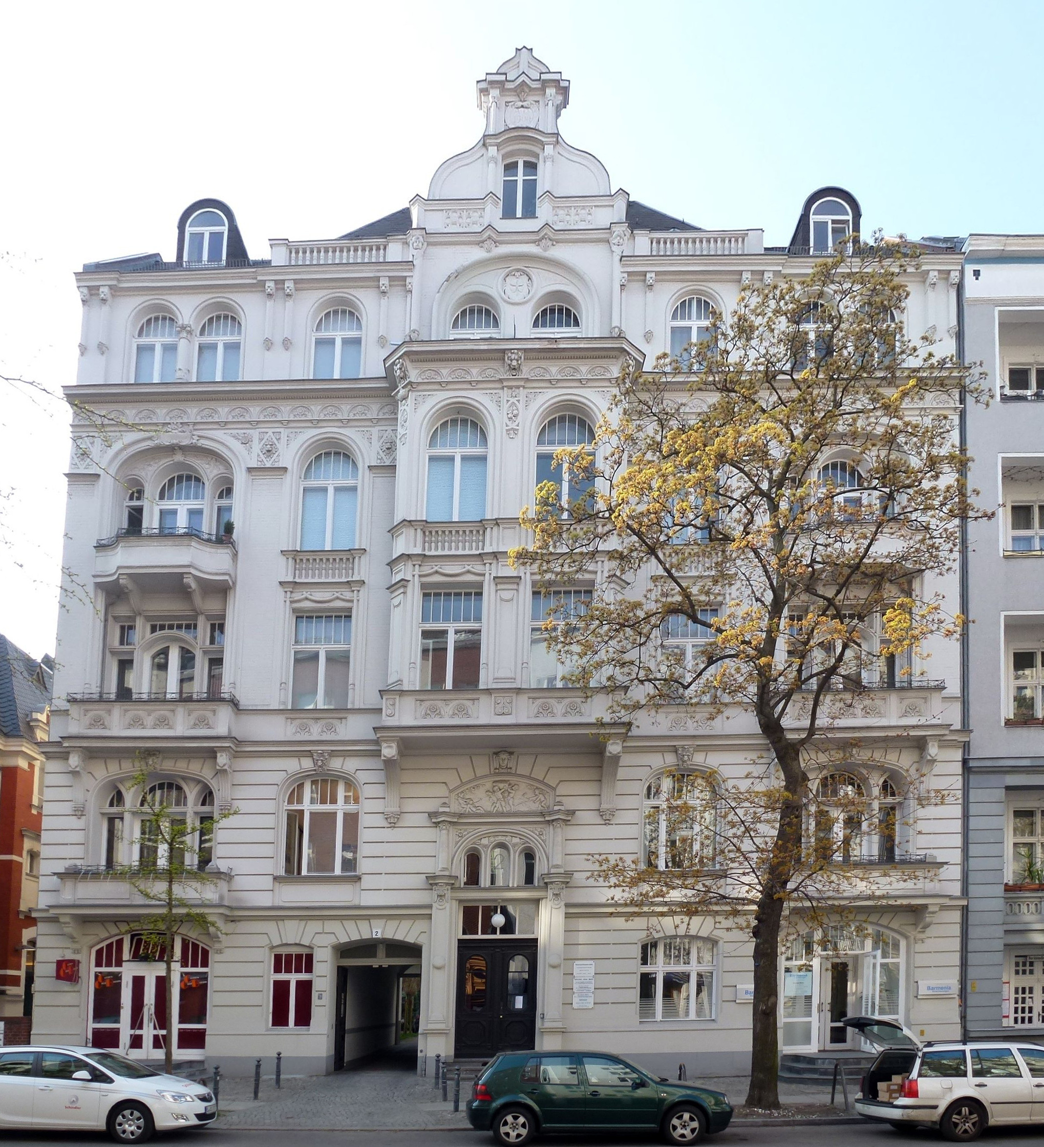 Berlin-Charlottenburg Carmerstraße 2